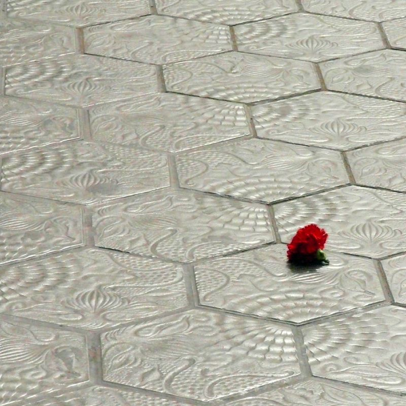 Paviment hidràulic dissenyat pel col·laborador de Gaudí, Joan Beltran, per a la casa Batllo, tot i que es va acabar instal·lant a la casa Milà